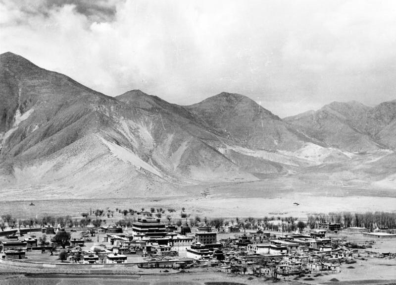 Tibetexpedition, Blick auf Kloster Samye Samjeh [Samye], Kloster